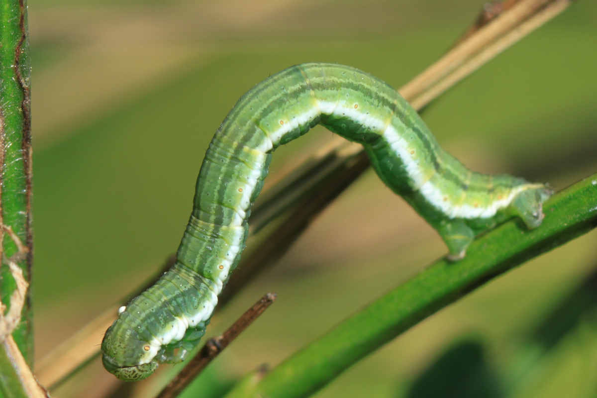 Raupe des Späten Ginsterspanners (Chesias legatella) am 29.4.2017 in der Schwetzinger Hardt